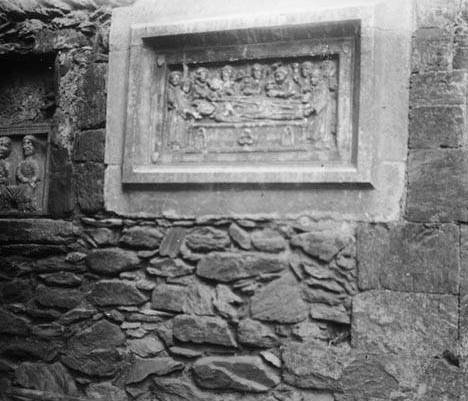 Imatge